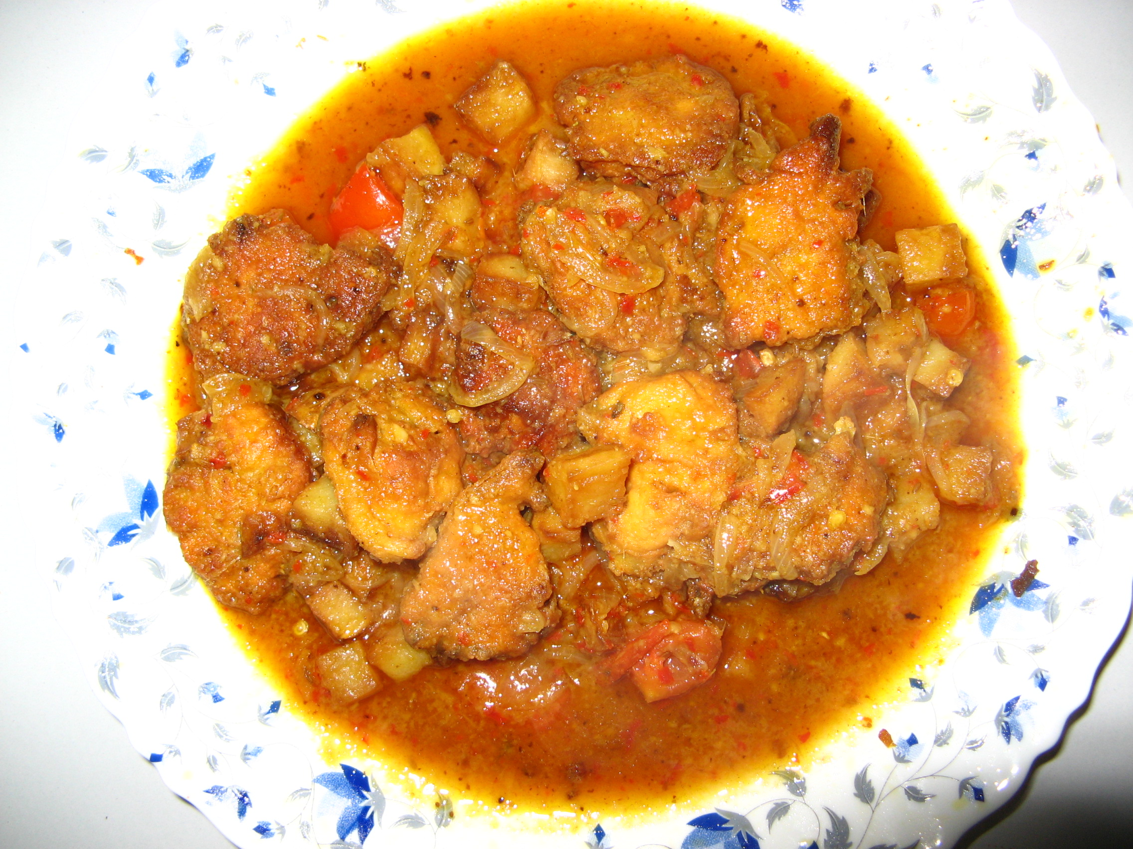 special machha bihana jhola